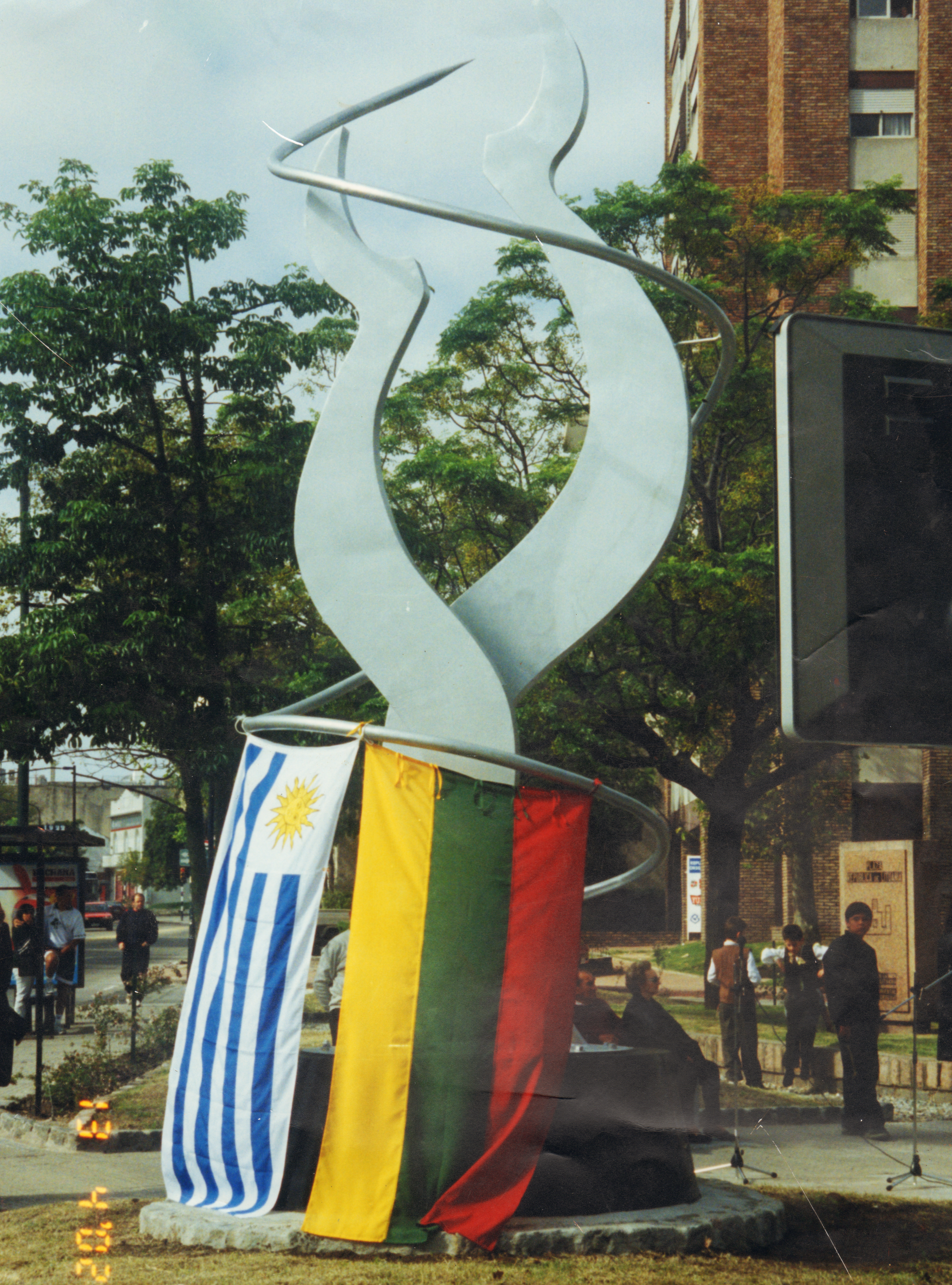 Eduardo Lapaičio skulptūra Lietuvių aikštėje. Lietuvos literatūros ir meno archyvas